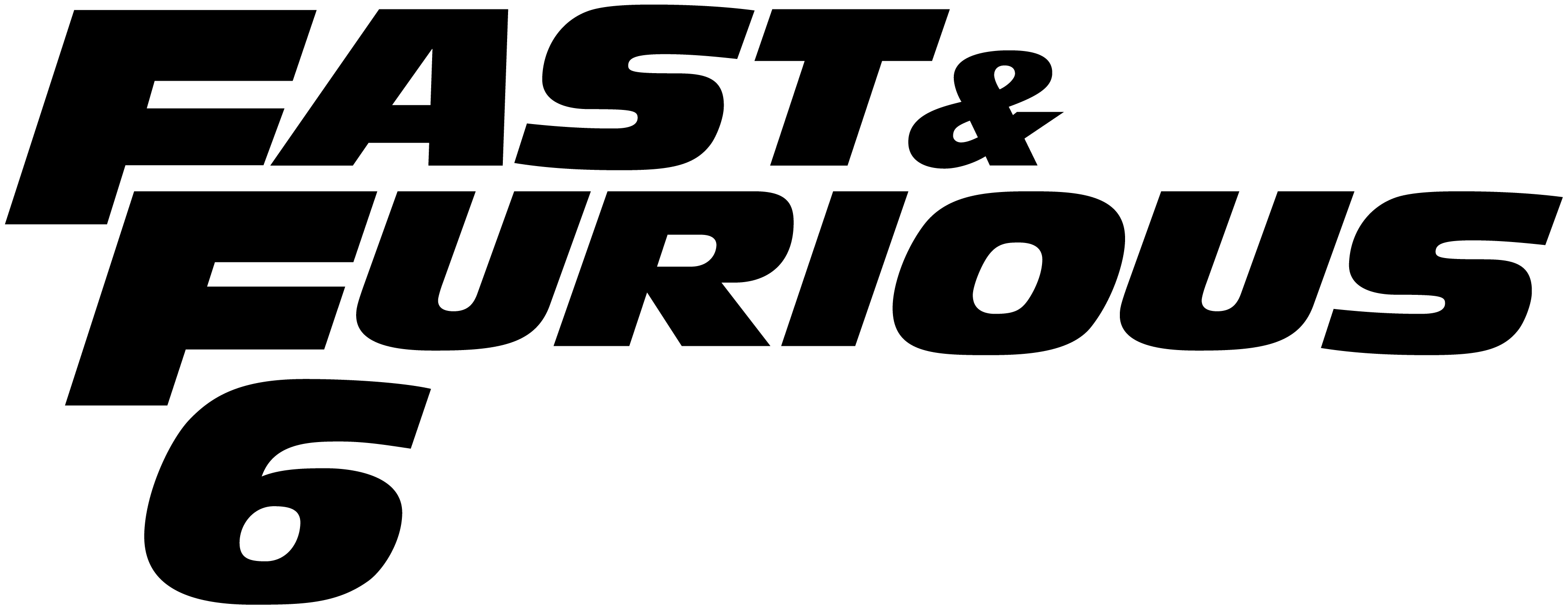 Logo de Fast and Furious 6 (2013).